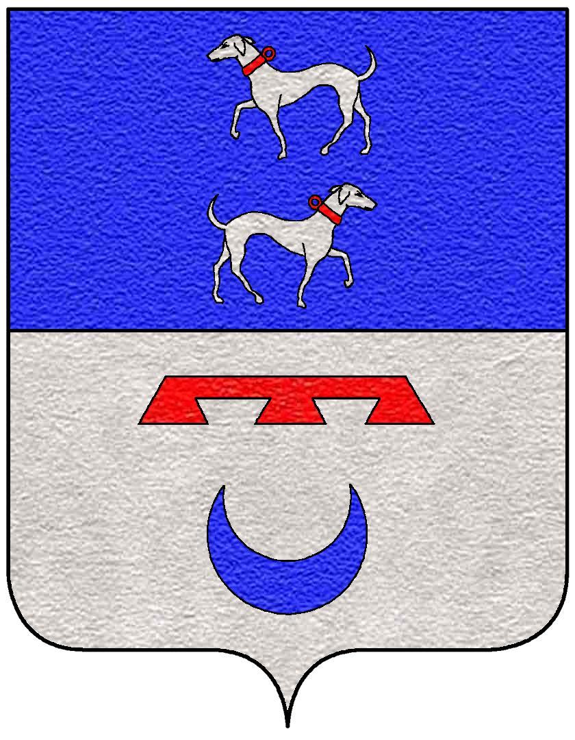 Stemma della famiglia Cagiano di Azevedo